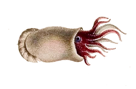 Spirula spirula